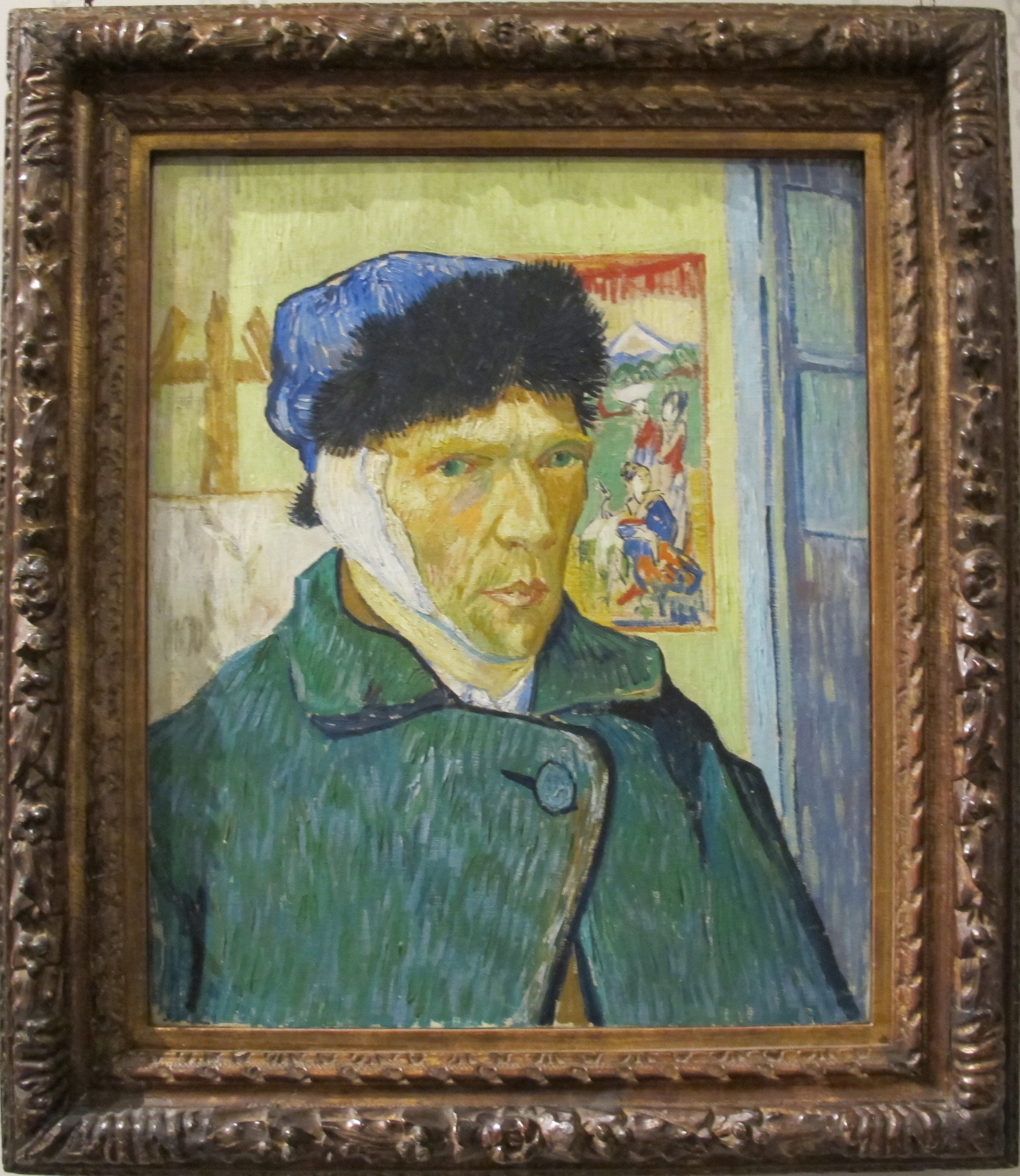 Vincent van gogh, autoritratto con un orecchio bendato, 1889